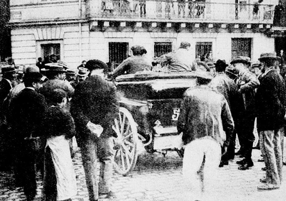 Émile Levassor au virage à Bordeaux, lors du Paris-Bordeaux-Paris 1895. Devant le café anglais, aux allées de Tourny, 5 min d'arrêt et coupe de champagne avec M. Cazalet, l'adjoint au maire - L'Almanach des Sports 1899 sous la direction de Maurice Leudet , librairie Paul Ollendorff, p.114